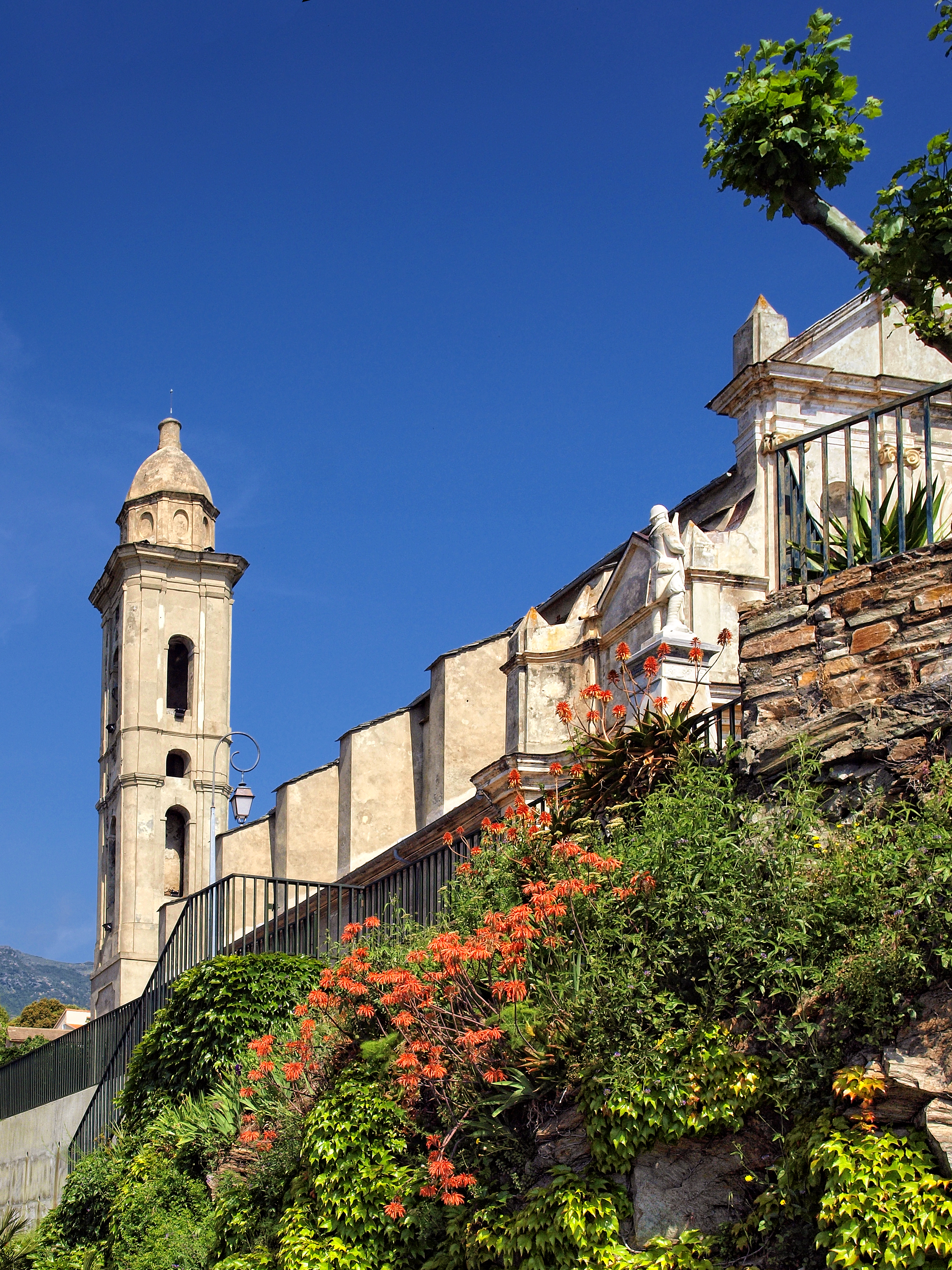 Ville-di-Pietrabugno (Corsica) - Église paroissiale Santa Lucia